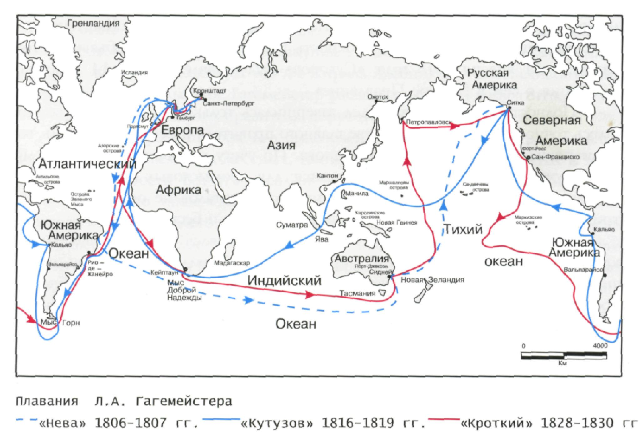 Карта плаваний Л.А.Гагенмейстера